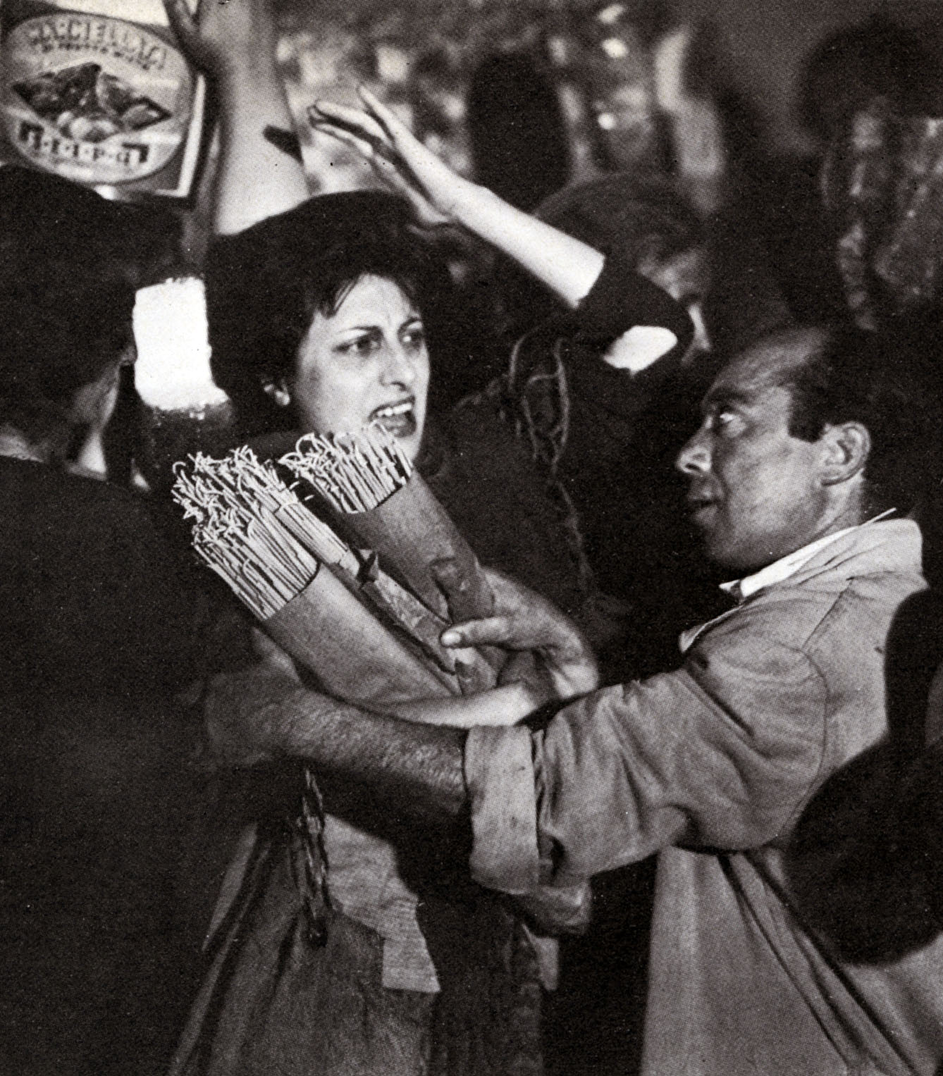 Screen schot : Anna Magnani e Ughetto Bertucci in L'Onorevole Angelina (1948) de Mario Mattoli